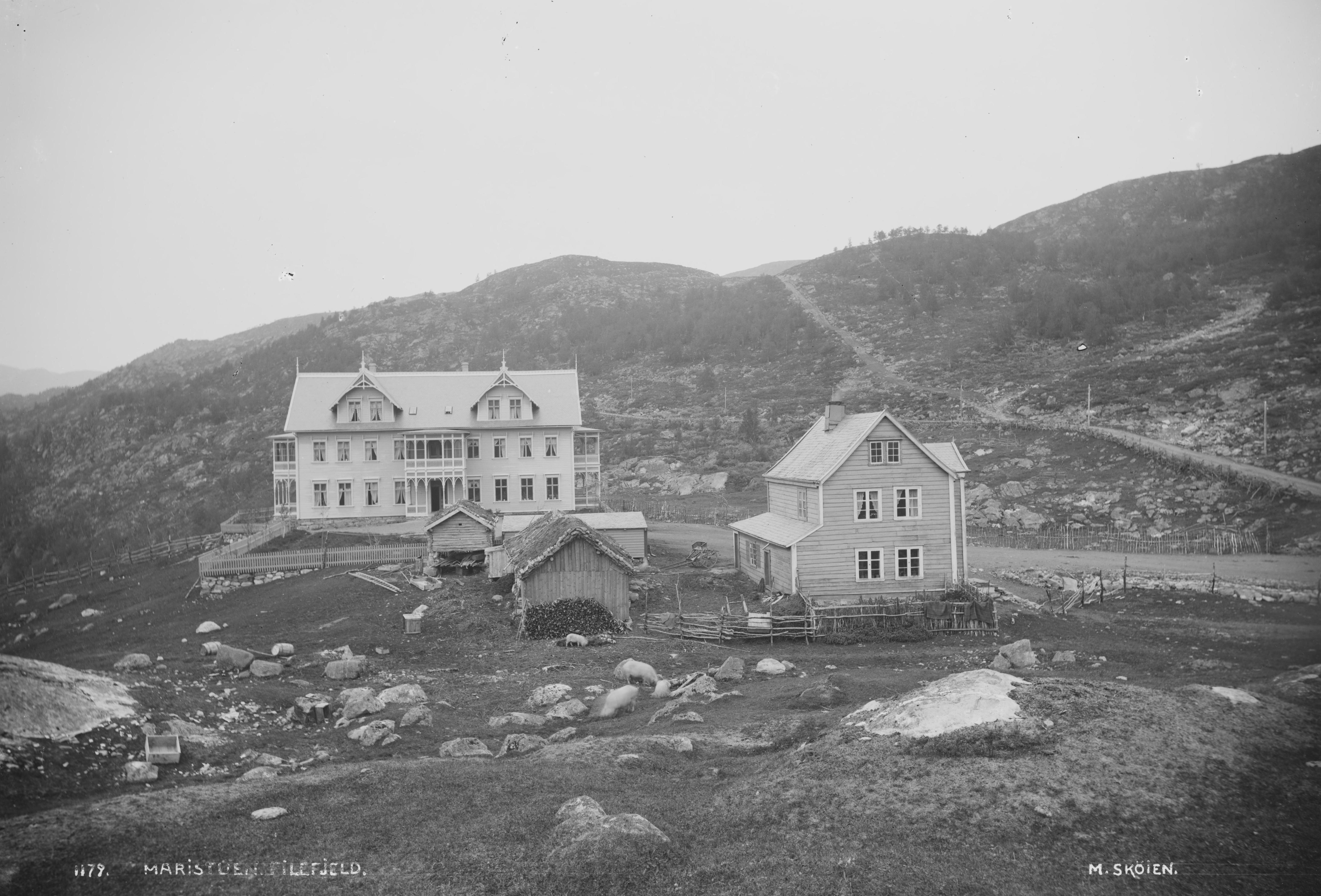 Påskrift negativ: 1179 Maristuen Filefjeld M.Skøien Påskrift konvolutt: B286 Borgund Maristuen hotel [Riksantikvaren] Sted: Borgund,Filefjell Kommune: Lærdal Fylke: Sogn og Fjordane Tagger: landskap hotell Maristuen hotel